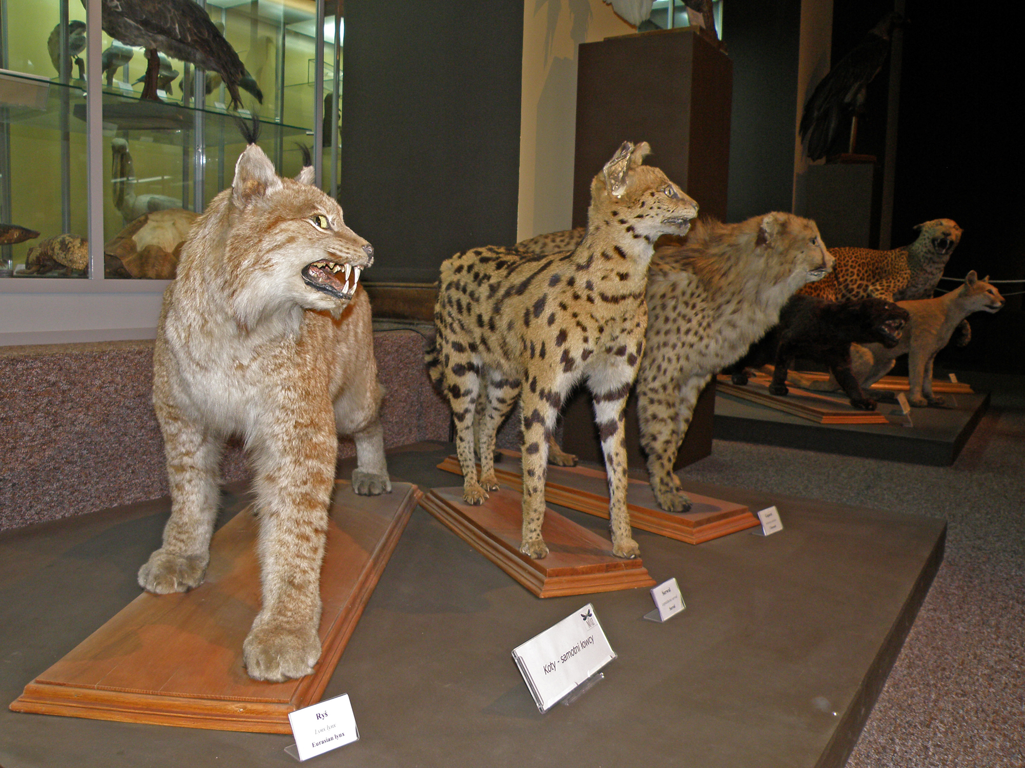 Muzeum Ewolucji Instytutu Paleobiologii PAN